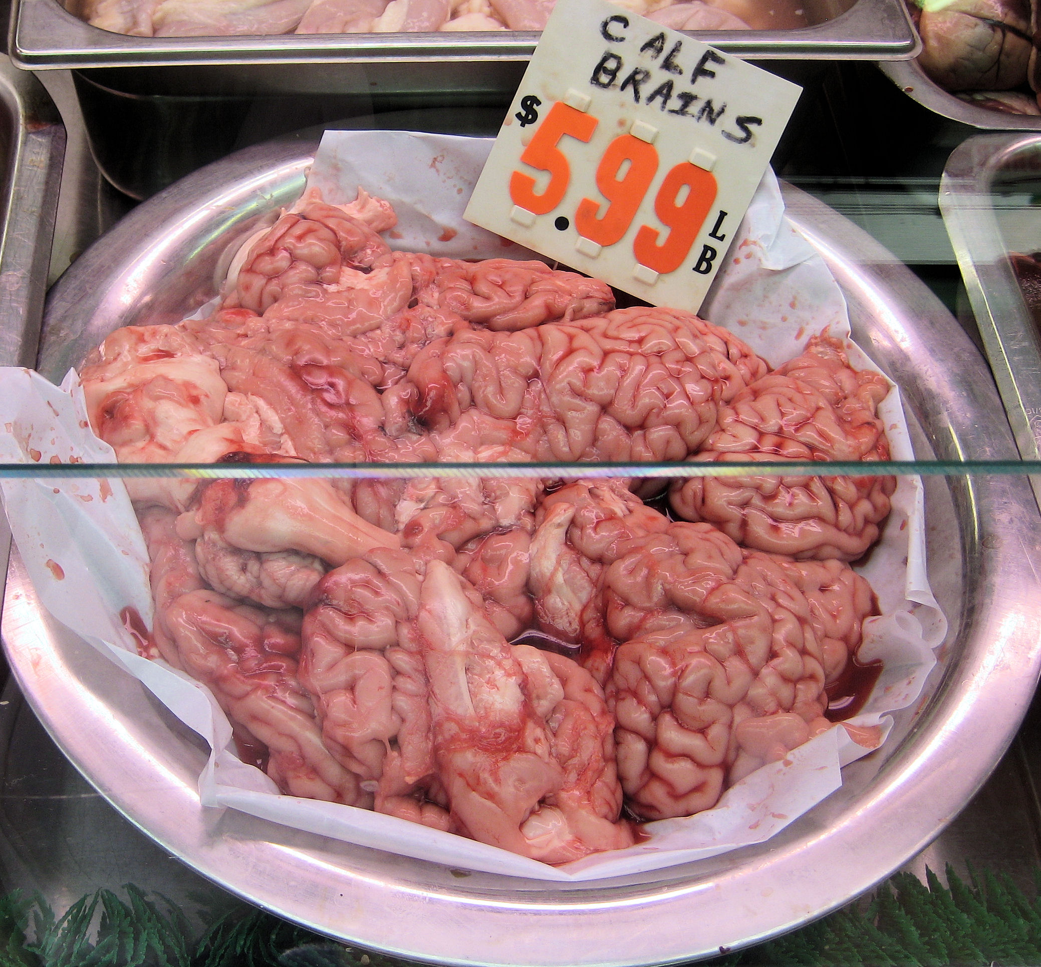 N/R